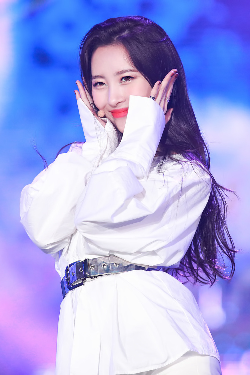 171001 코리아 뮤직 페스티벌 선미